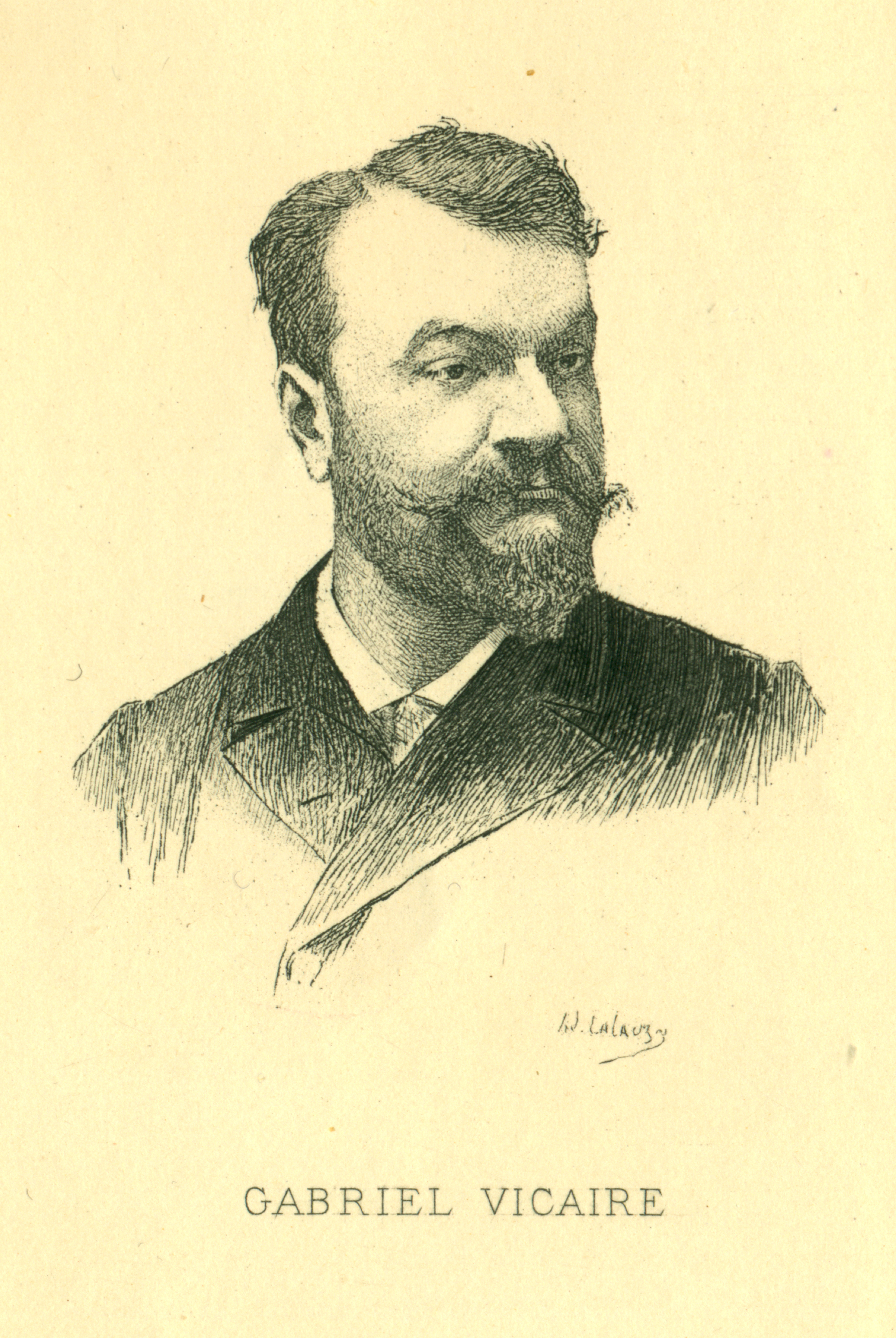 portrait de Gabriel Vicaire (1848-1900), fin XIXe siècle (gravure)